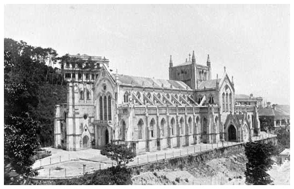 1897年香港聖母無原罪主教座堂